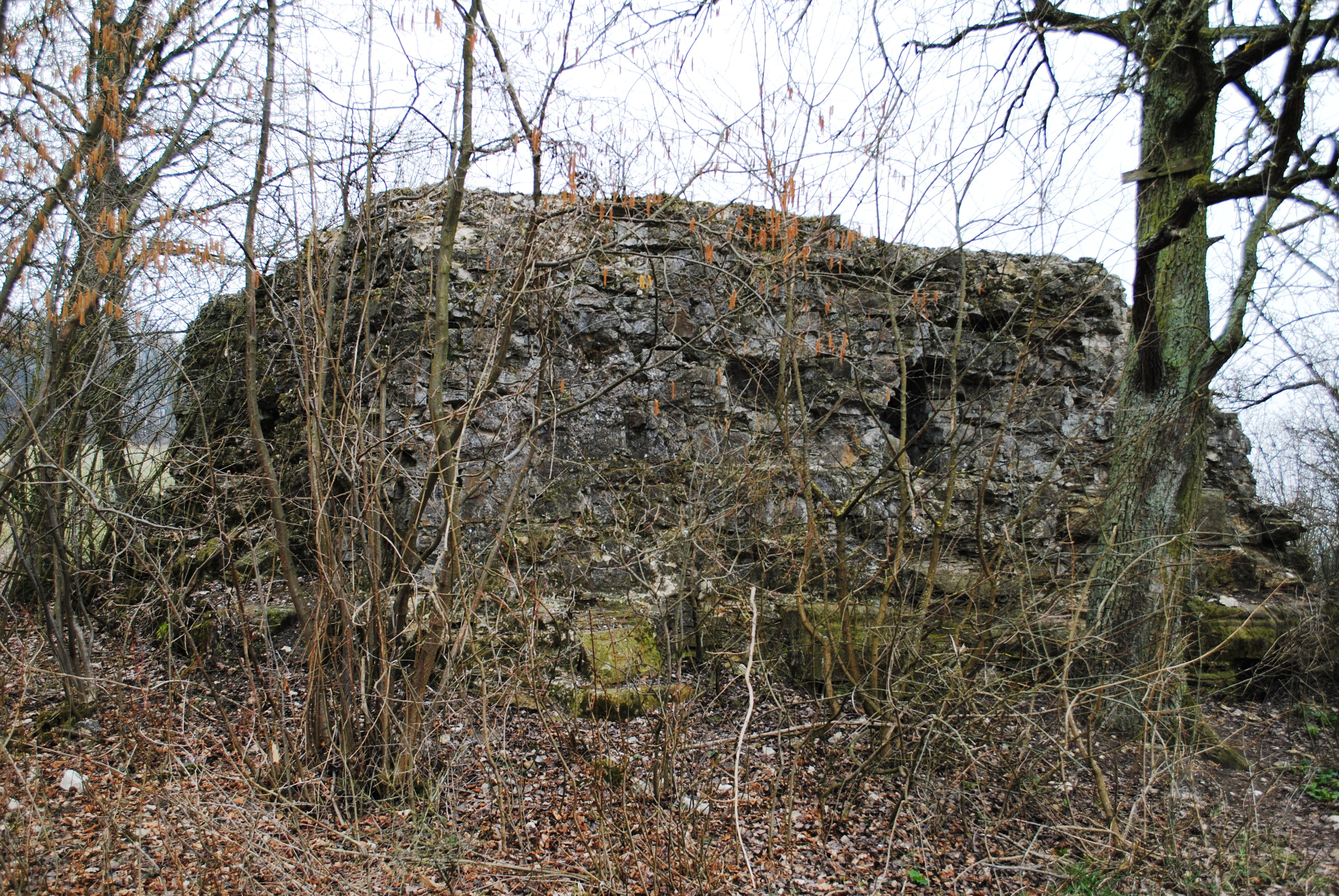 Stettenburg, Reste, Volkach-Obervolkach, Fundamentspuren einer viereckigen Anlage und Reste des Bergfrieds, 13. Jh.